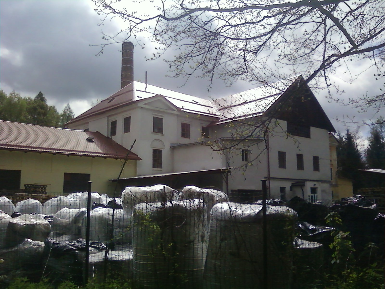 Bývalá škrobárna u zámku v Novém Dvoře u Kamene